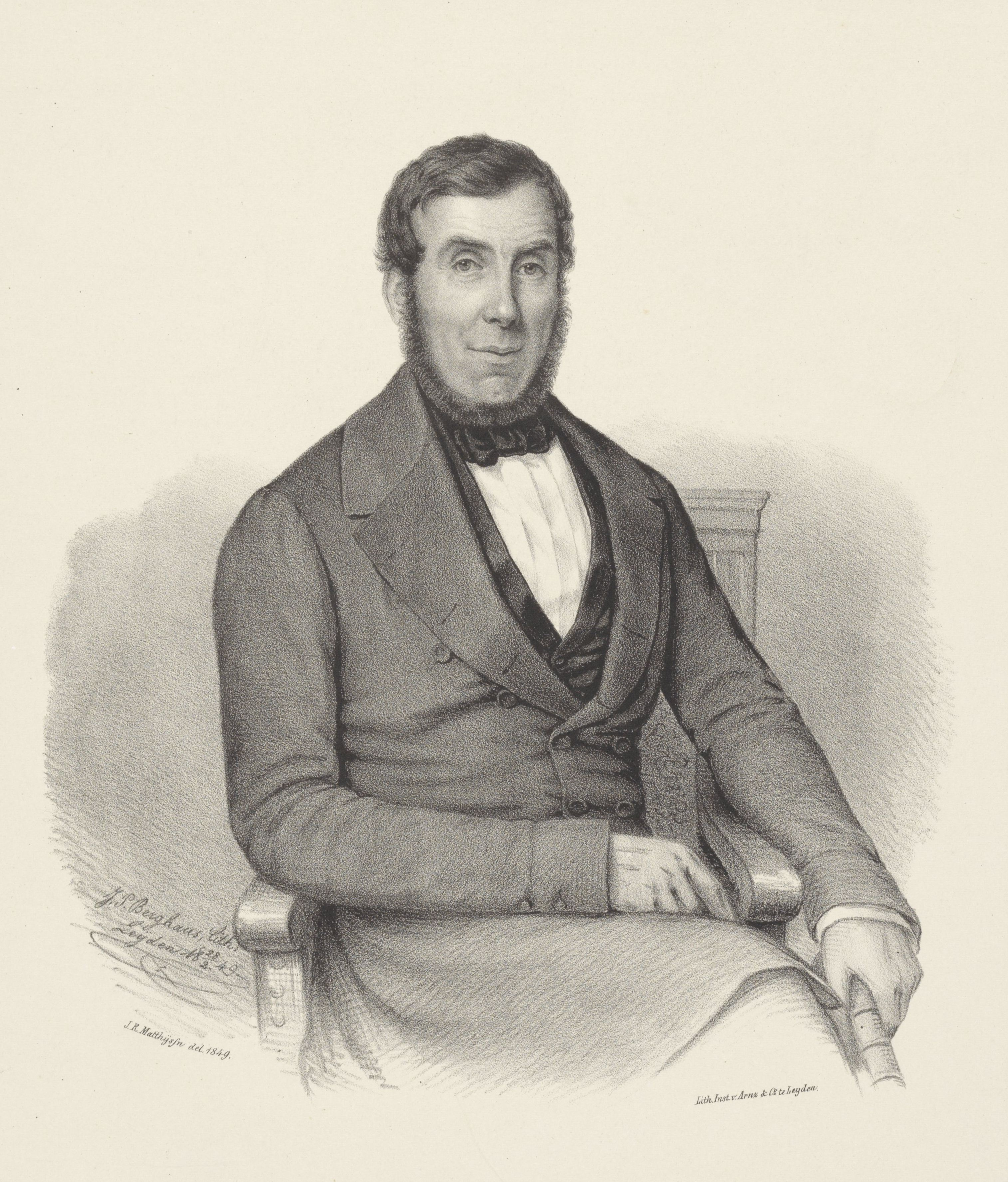 IdentificatieTitel(s): Portret van Wessel KnoopsObjecttype: prent Objectnummer: RP-P-OB-27.705Catalogusreferentie: Van Someren 2988Omschrijving: De geportretteerde zit op een houten stoel. Zijn linkerarm hangt naast de stoel en in zijn hand heeft hij een wandelstok. Zijn rechterhand rust in zijn schoot.VervaardigingVervaardiger: prentmaker: Johann Peter Berghaus (vermeld op object) naar ontwerp van: Jan Rijk Matthijssen (vermeld op object) drukker: August Arnz & Co. (vermeld op object)Plaats vervaardiging: prentmaker: Leiden naar ontwerp van: Nederlanddrukker: LeidenDatering: 28-feb-1849Fysieke kenmerken: lithografie op chine colléMateriaal: papier chine collé Techniek: lithografie (techniek)Afmetingen: blad: h 440 mm × b 329 mmOnderwerpWat: historical personswalking-stick, staffWie: Wessel KnoopsVerwerving en rechtenVerwerving: onbekend 2006Copyright: Publiek domein